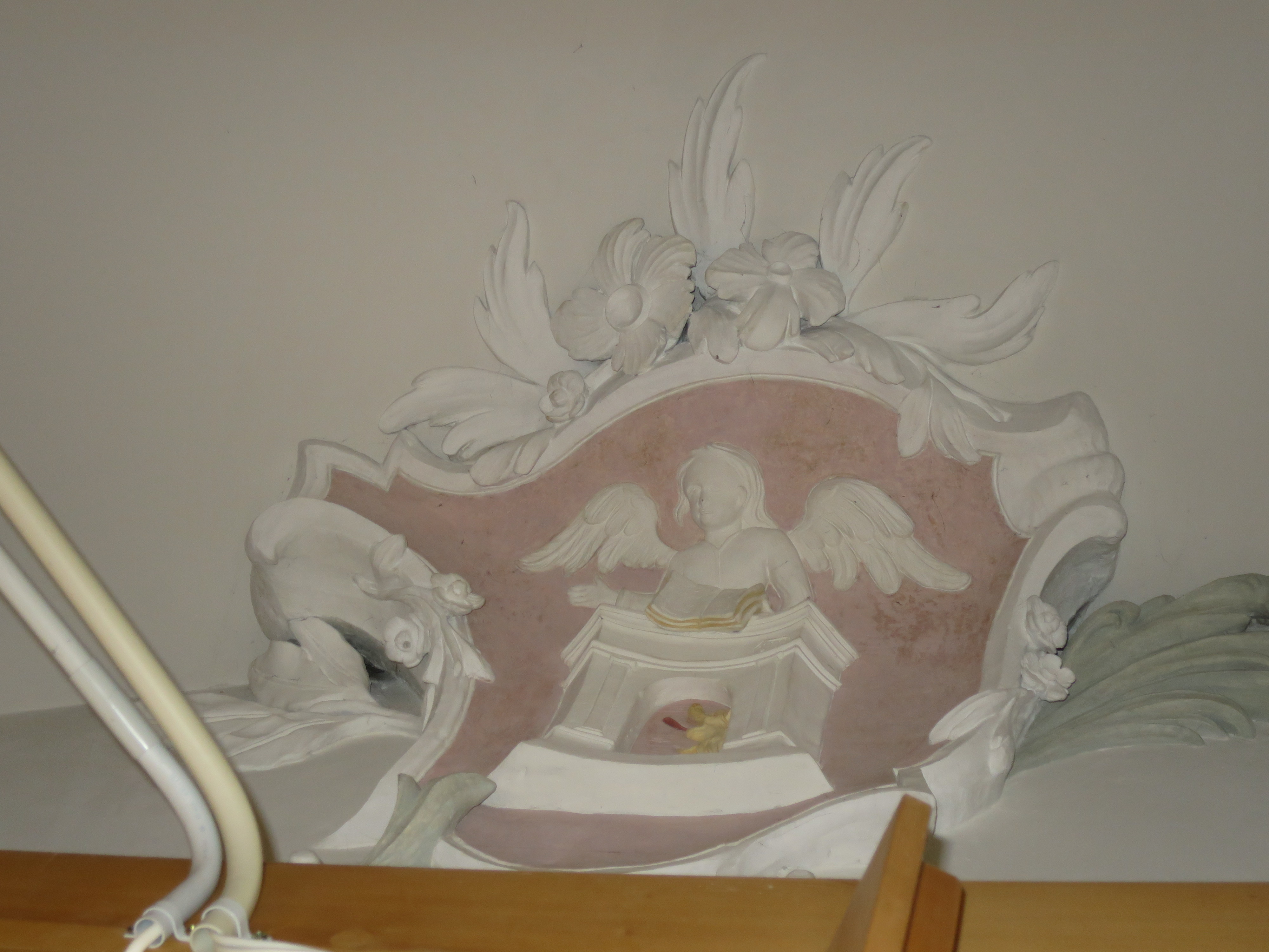 Reformierte Kirche Wädenswil - Wappen von Johann Ulrich Grubenmann von Teufen